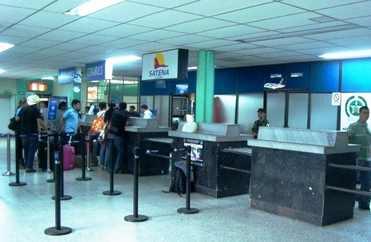 Hall principal del Aeropuerto de Florencia, Caquetá.